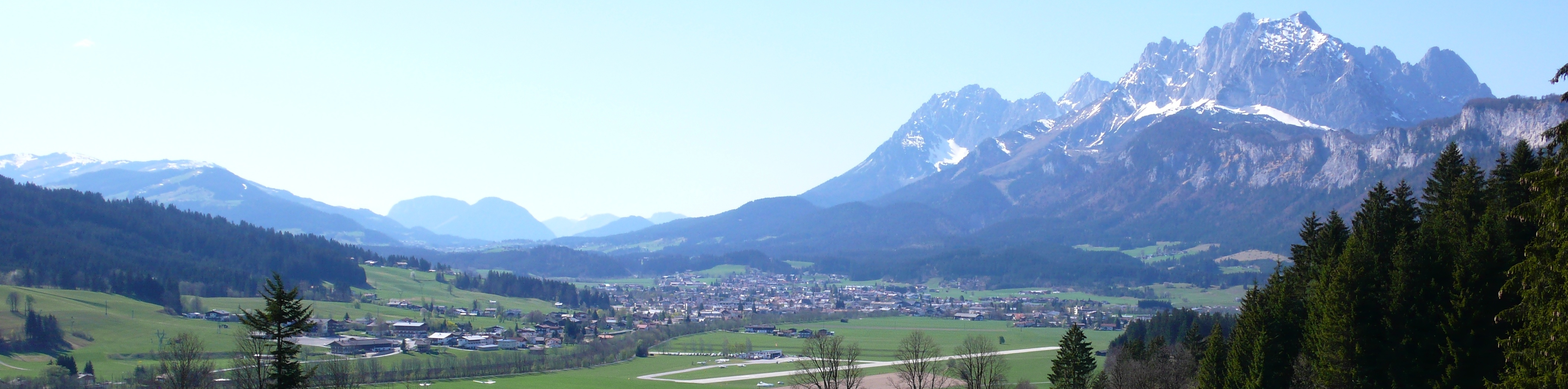 St. Johann in Tirol verkleinertes Panorama